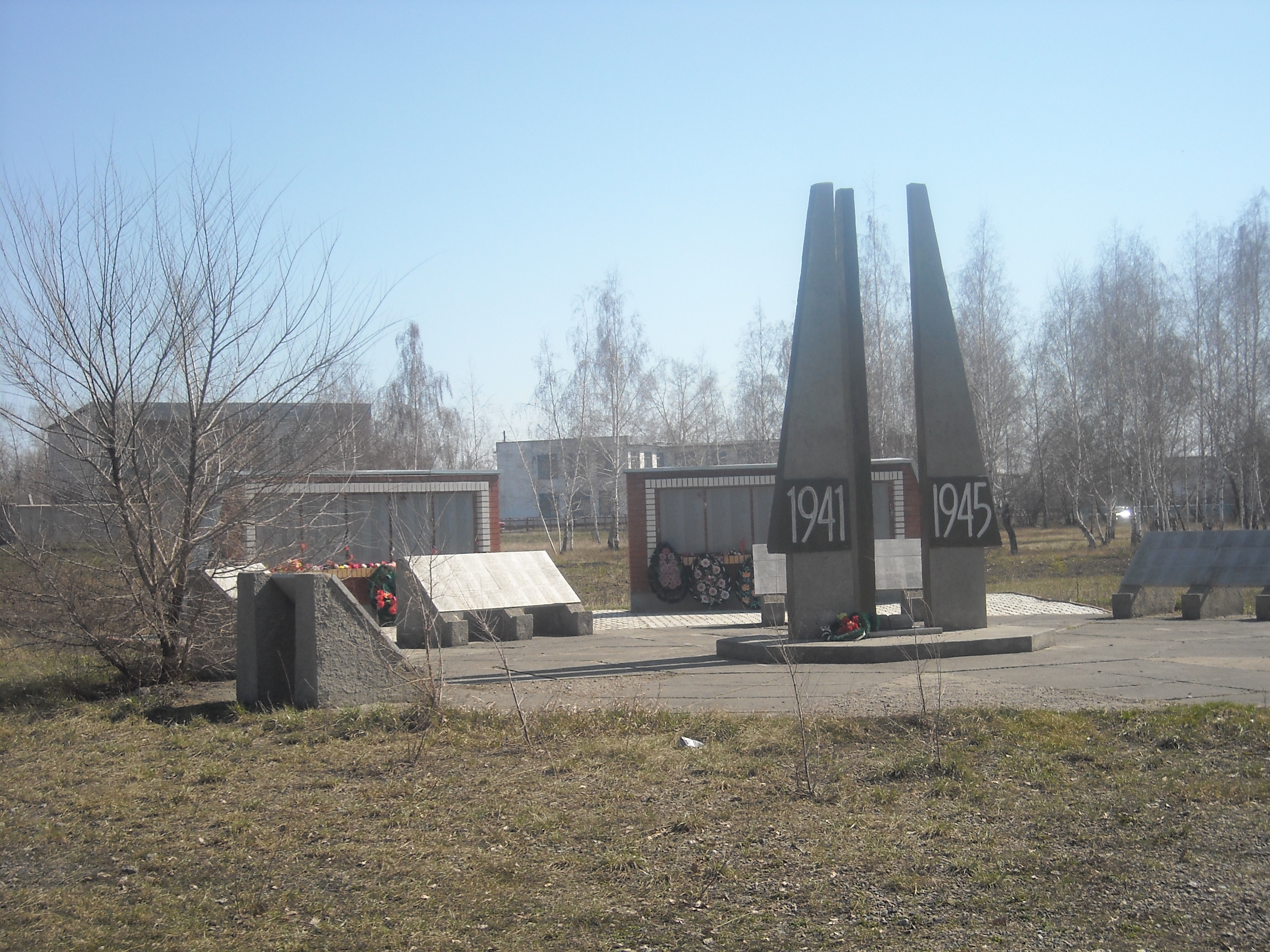 Мемориальный комплекс павшим в годы Великой отечественной войны